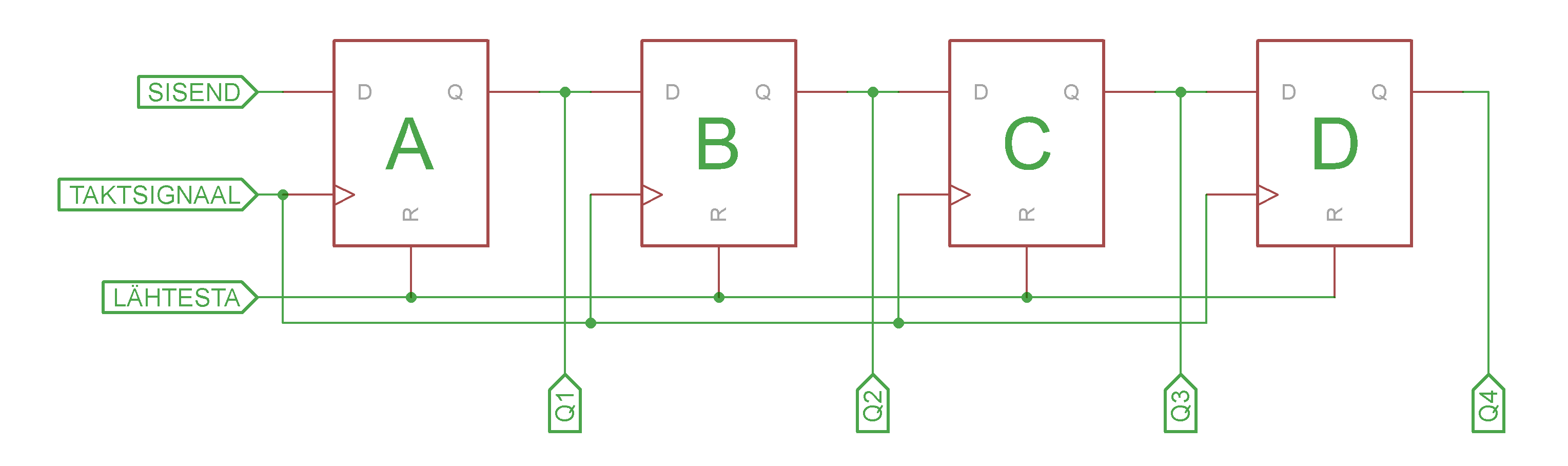 D-trigeritest koostatud Järjestiksisen paralleelväljund nihkeregister